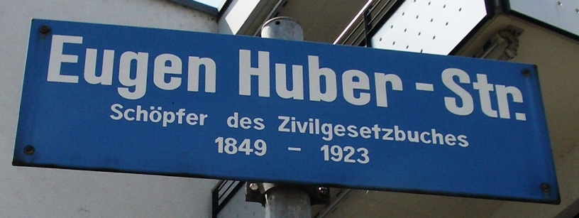 Eugen Huber-Str., Zurich, Switzerland self-made, August 2006